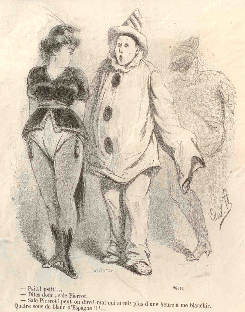 Dessin d'Edward Ancourt illustrant les bals masqués du Carnaval de Paris, extrait du Journal Amusant, numéro 737, 12 février 1870.